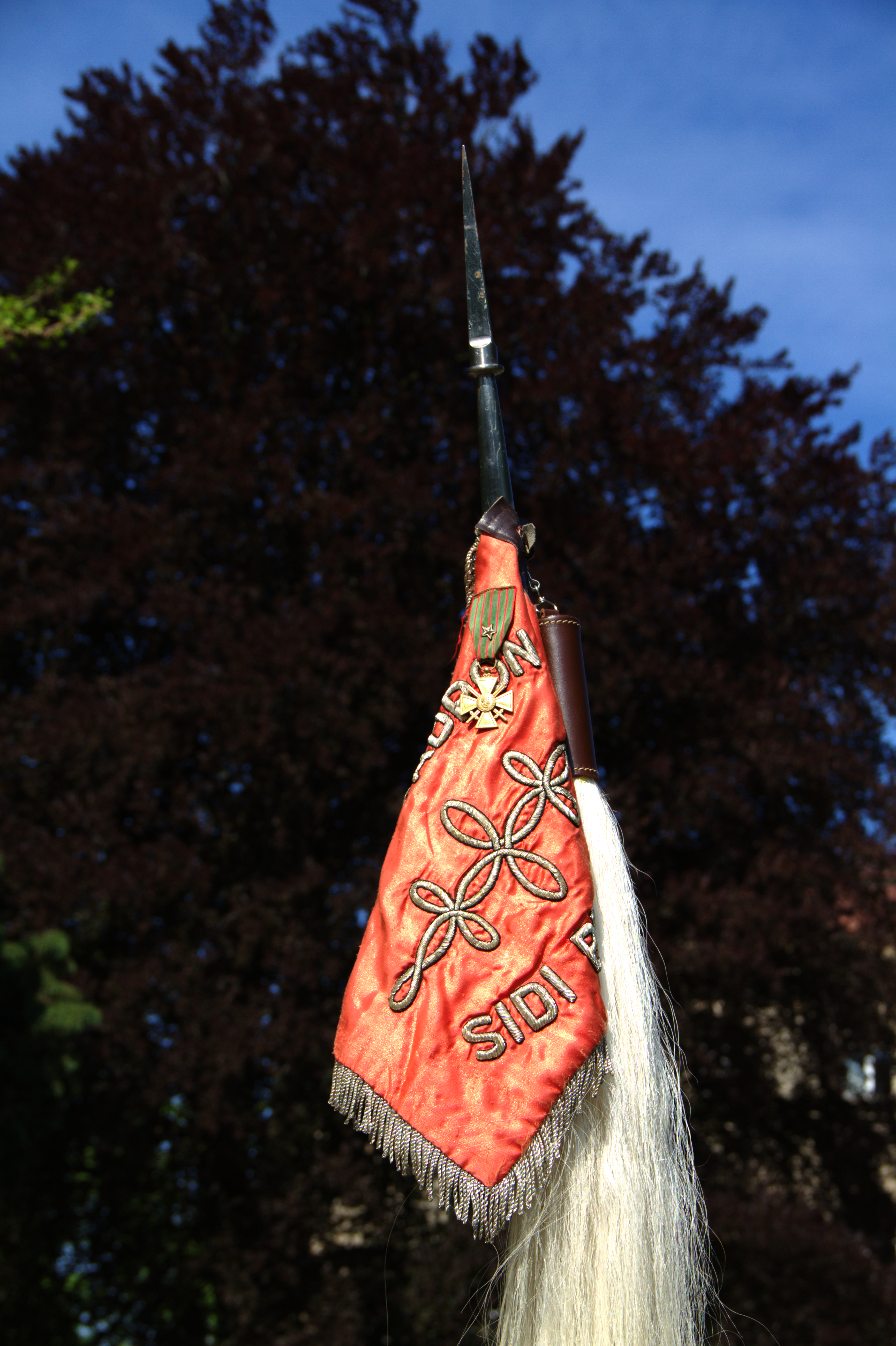 Cérémonie commémorative du 8-mai-1945 Strasbourg, place de la République 8 mai 2013